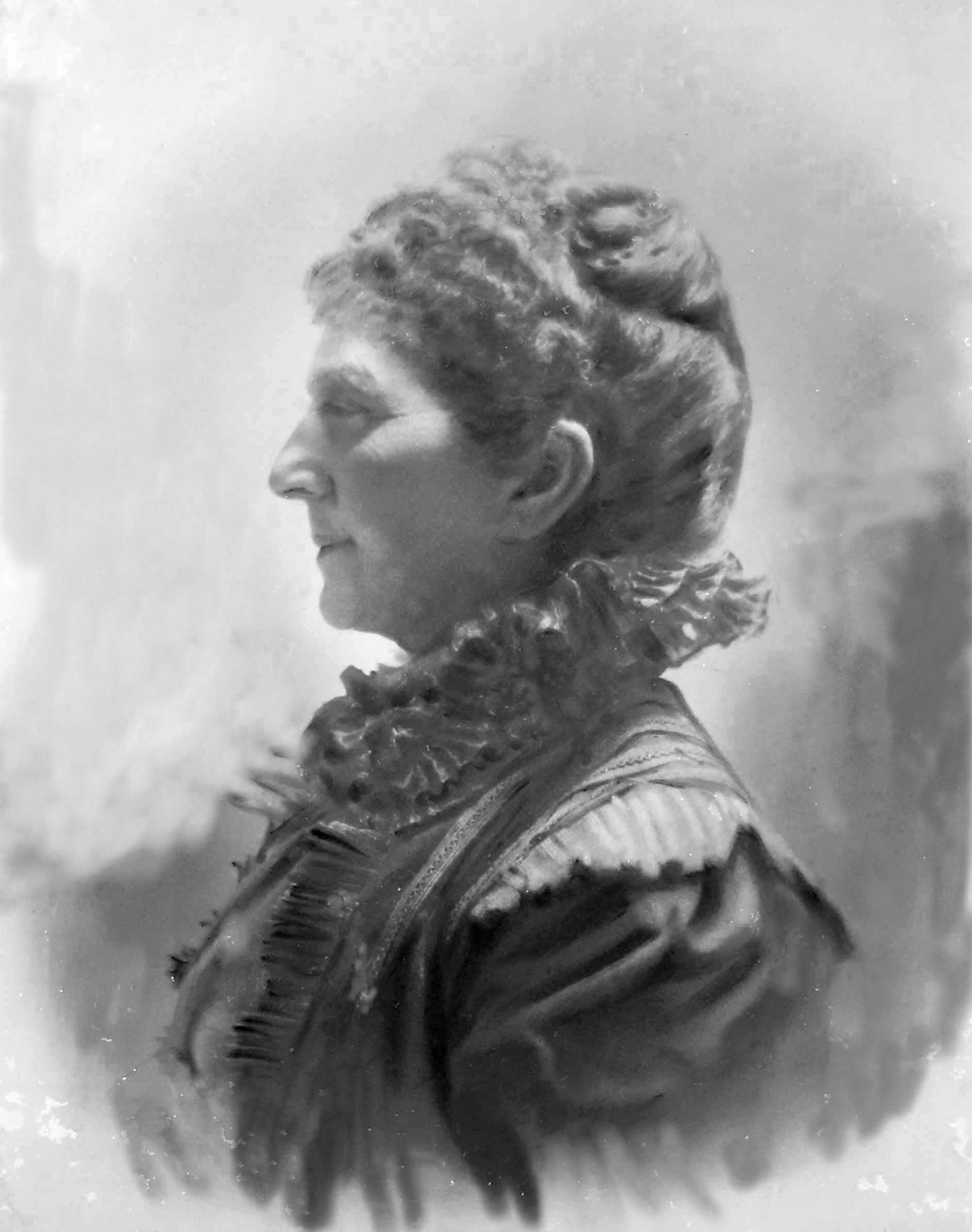 Emma Guerrieri Gonzaga, nata Hohenemser